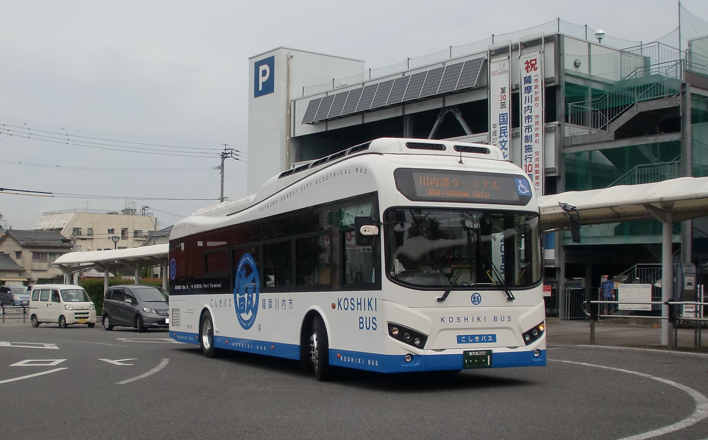 川内駅バス停に到着する川内港シャトルバス（こしきバス）。電気自動車である。